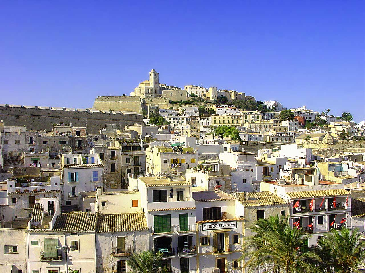 Ibiza Stadt mit seiner berühmten Altstadt aus Sicht des alten Hafens